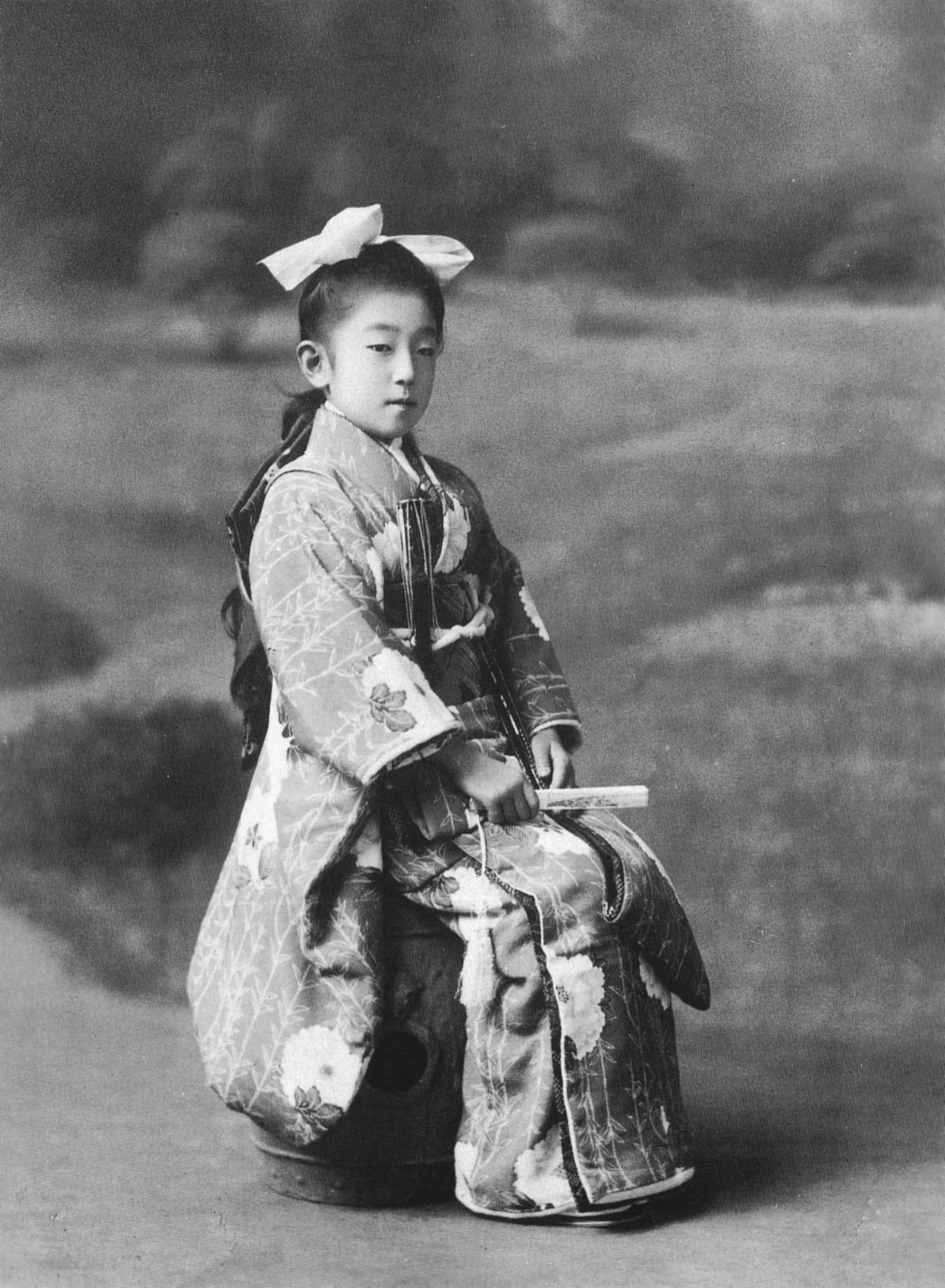 久邇宮良子女王（後の香淳皇后）。9歳頃。